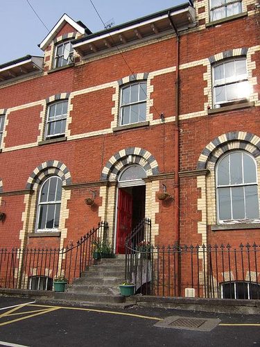 Georgian building, Letterkenny